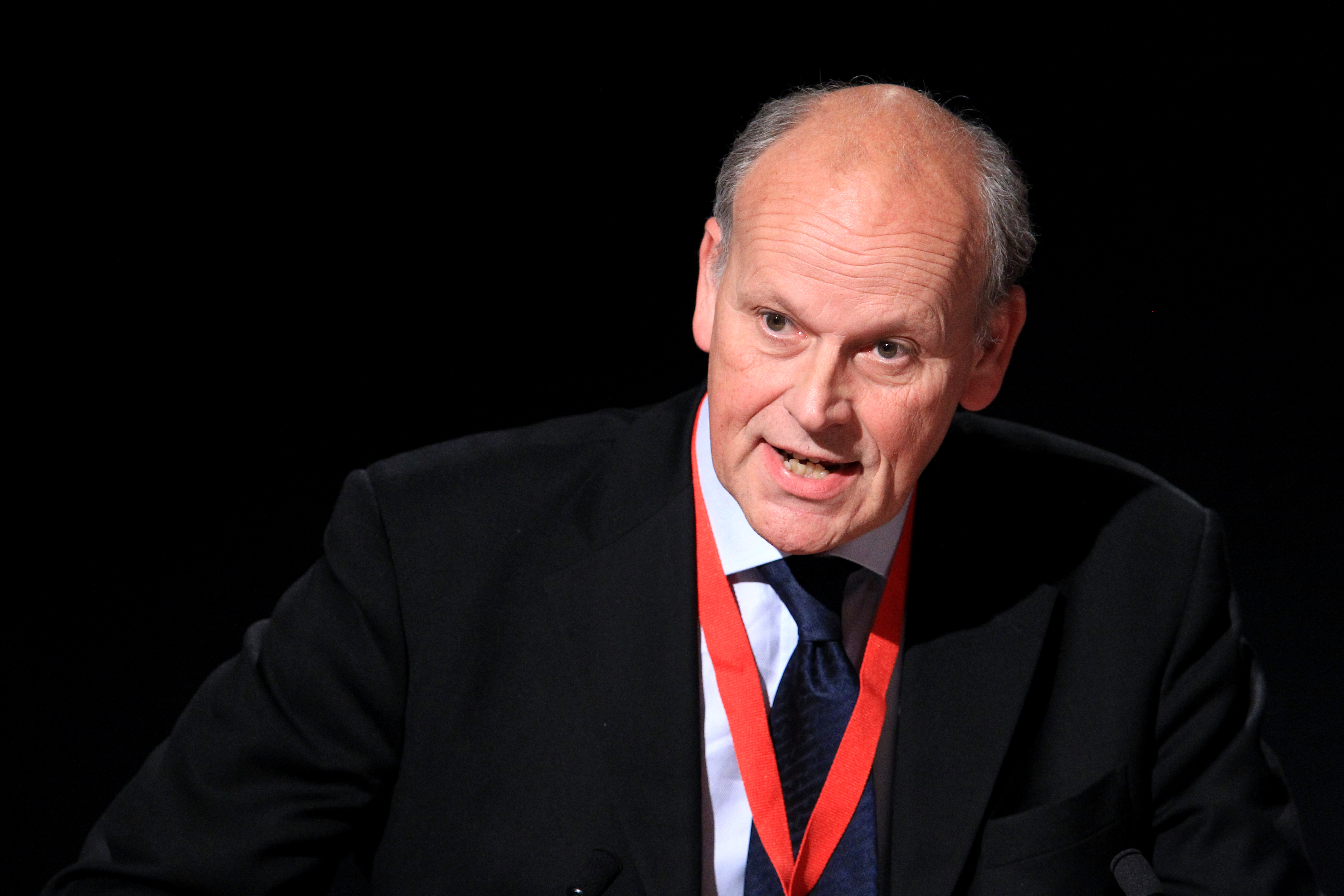 Michael Tetzschner vid Nordiska Rådets session i Reykjavik på Island. 2010-11-03.